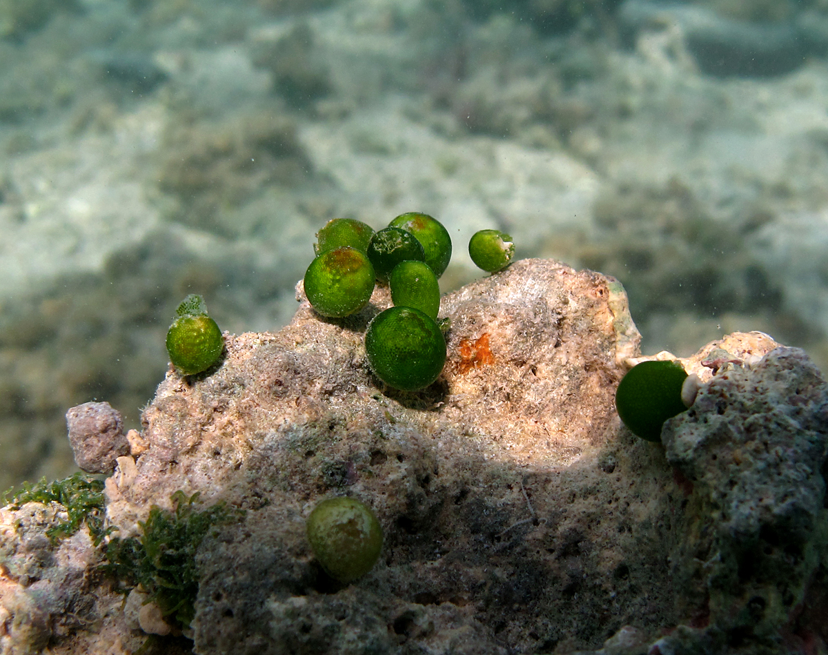 L'algue Bornetella sphaerica à la Réunion.